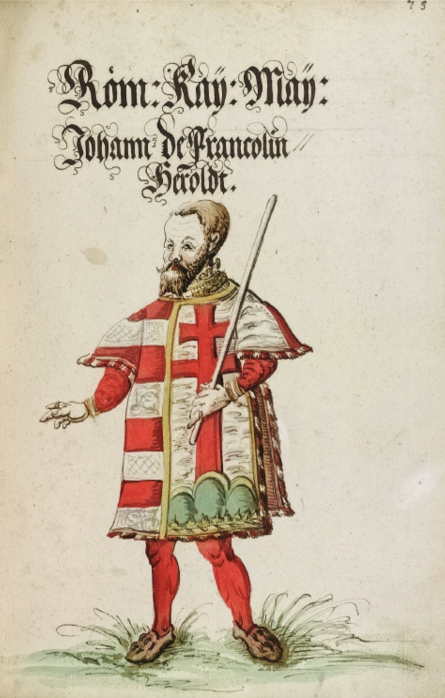 Johann von Francolin magyar herold, kép egy prágai címerkönyvből, 1563 Abb. 3. Wappenbuch, Ms a 20; KN, Èesko, folio 490r . (Teszelszky)